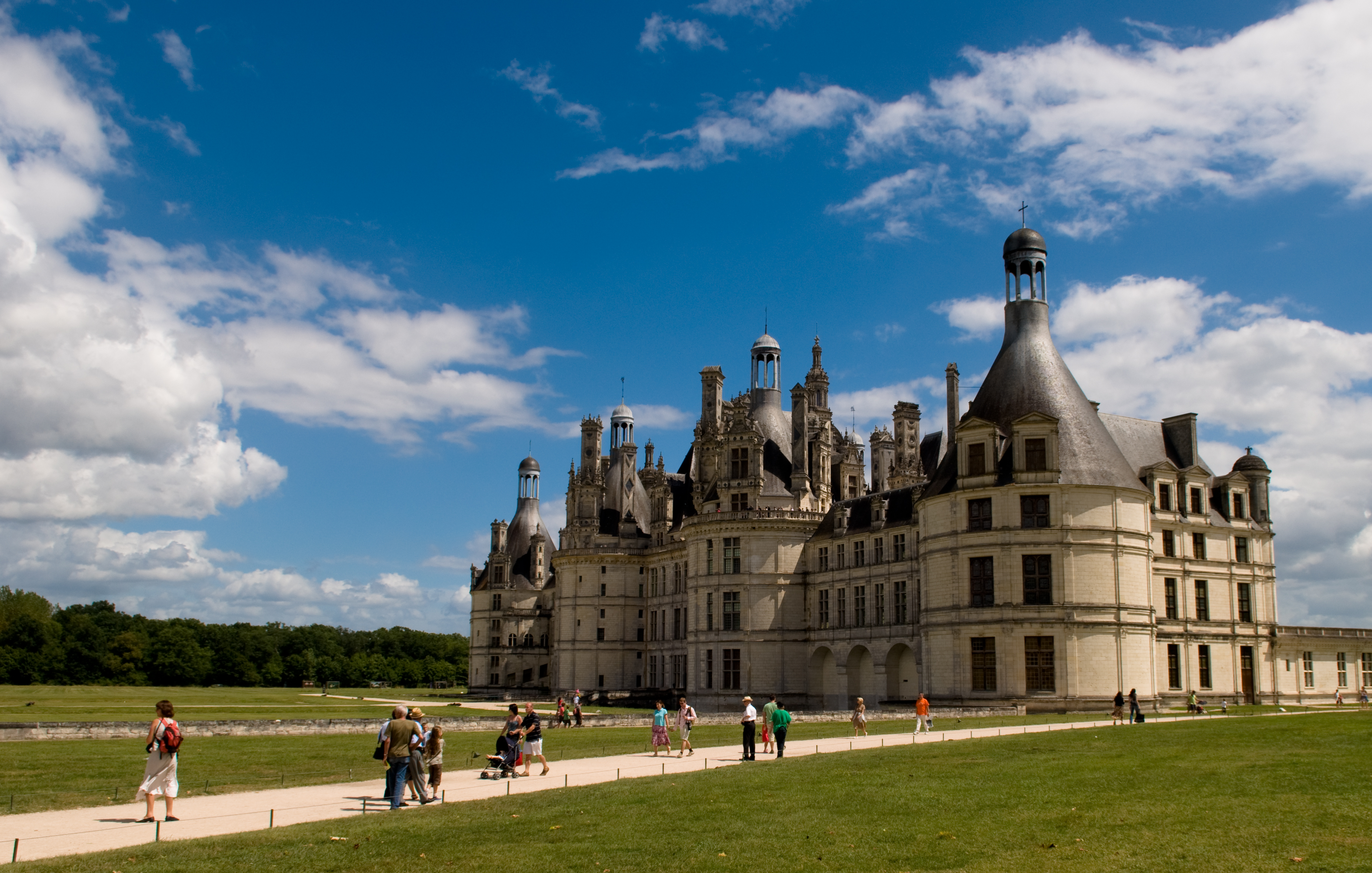 Château de Chambord